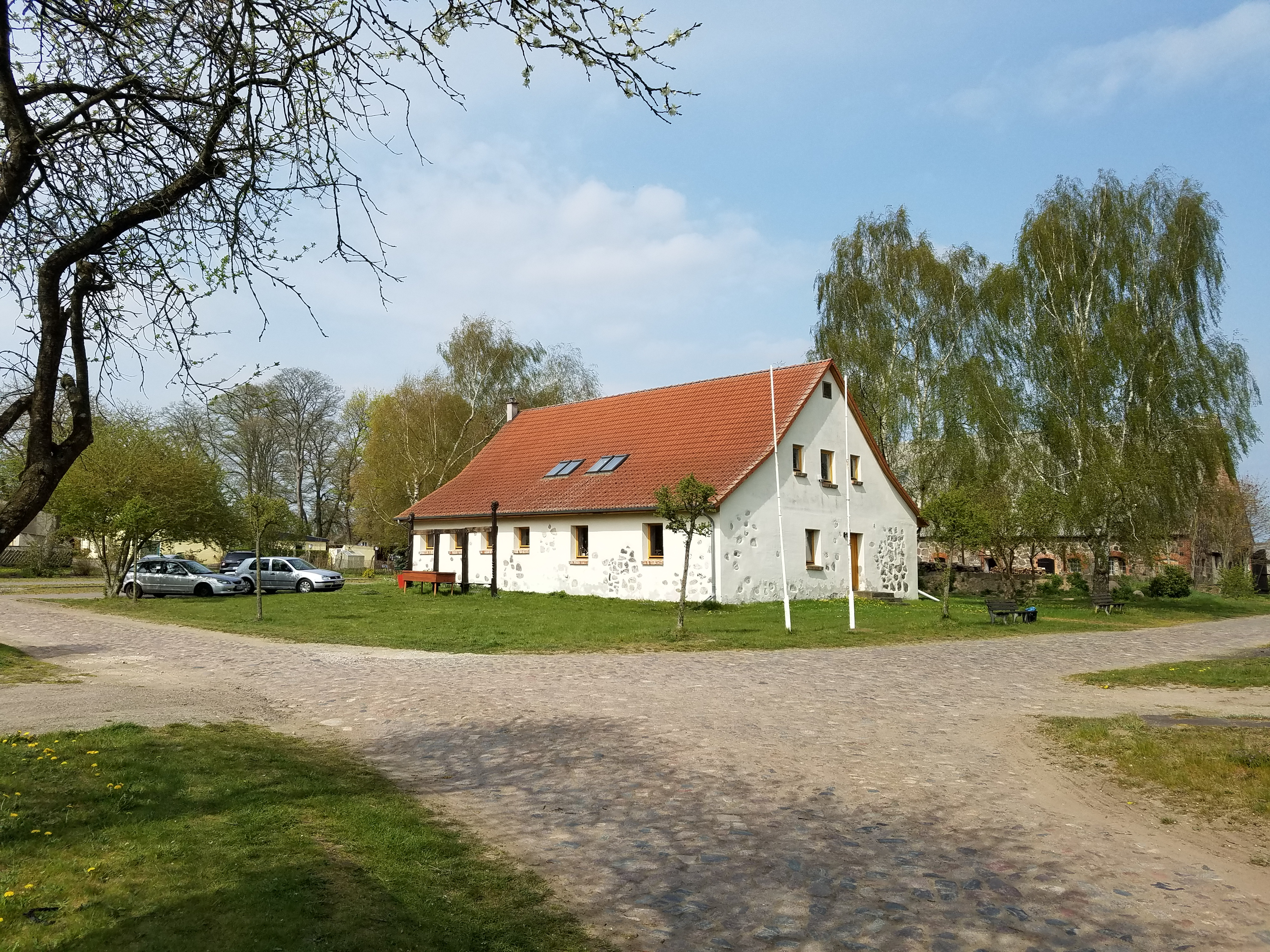 ehemaliger Schafstall am Schloss Wrangelsburg, Landkreis Vorpommern-Greifswald (Deutschland), heute Papiermanufaktur